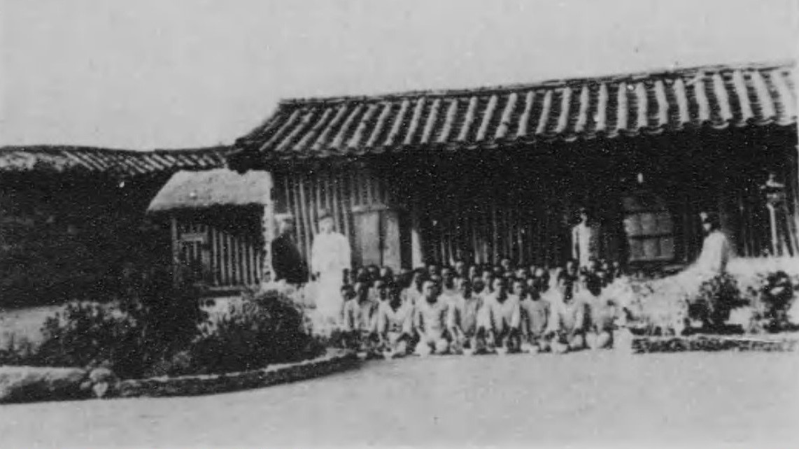 李氏朝鮮時代の公州の監獄 朝鮮写真帖 (朝鮮総督府, 1921)